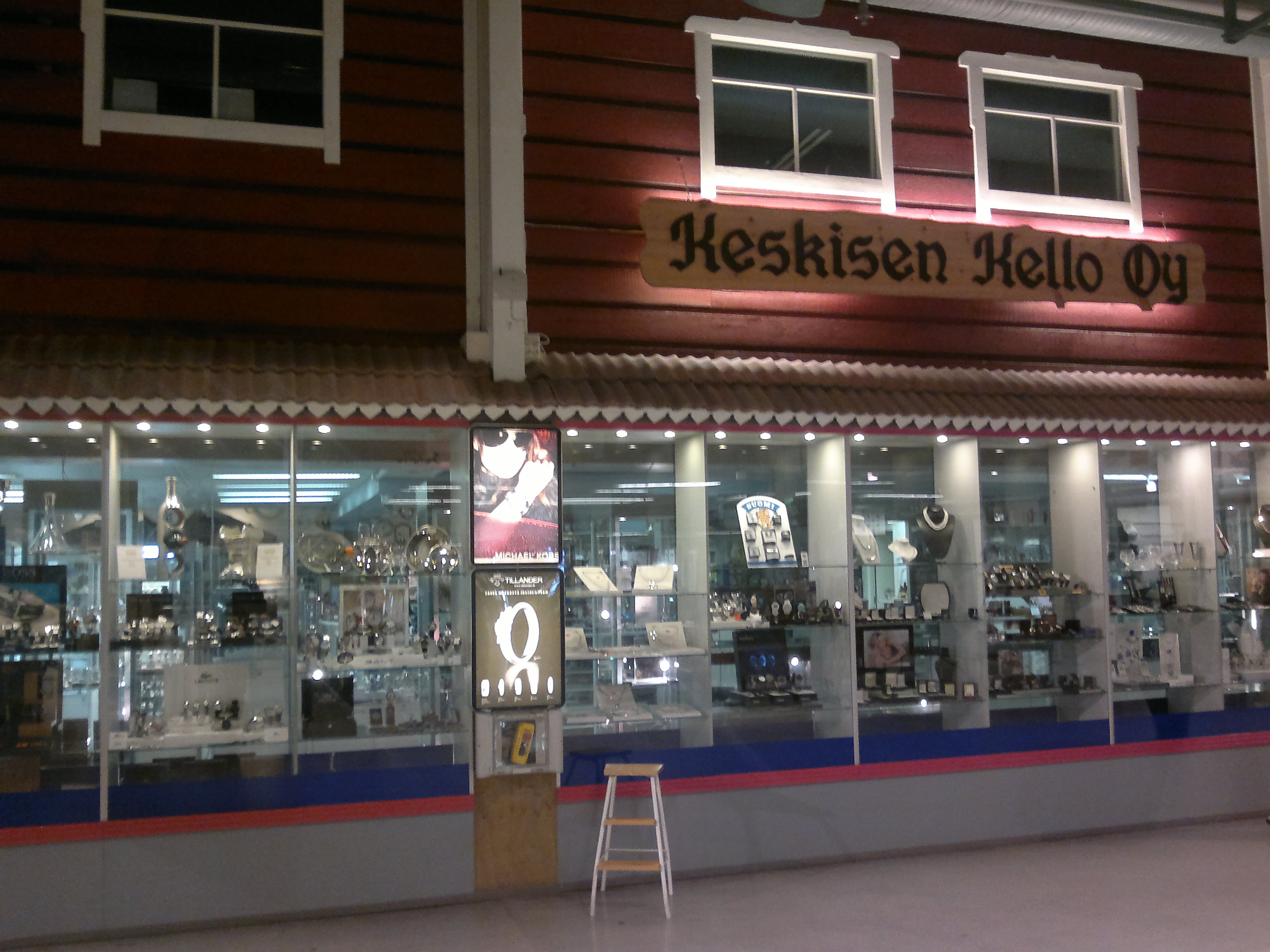 Keskisen Kello Veljekset Keskisen kyläkaupassa.